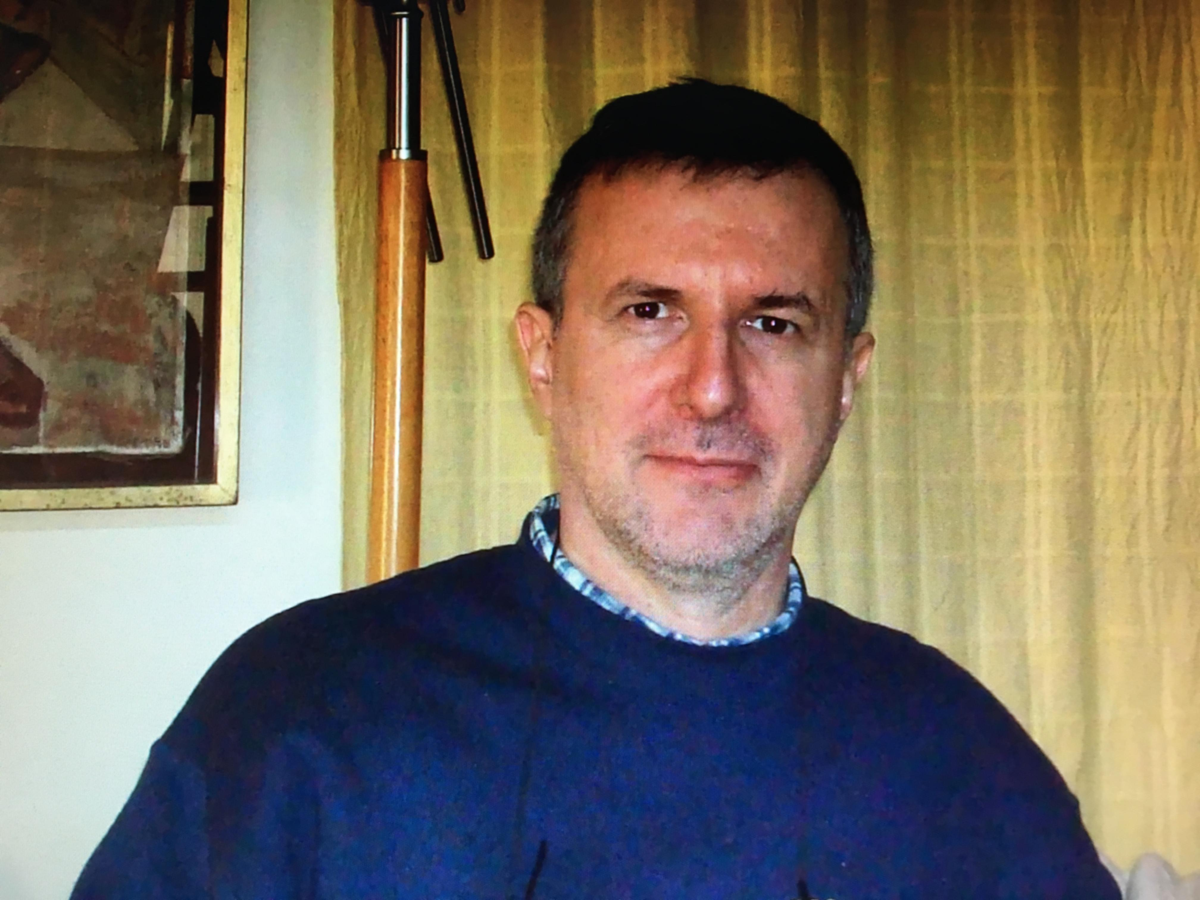 Paolo Ugoletti - compositore